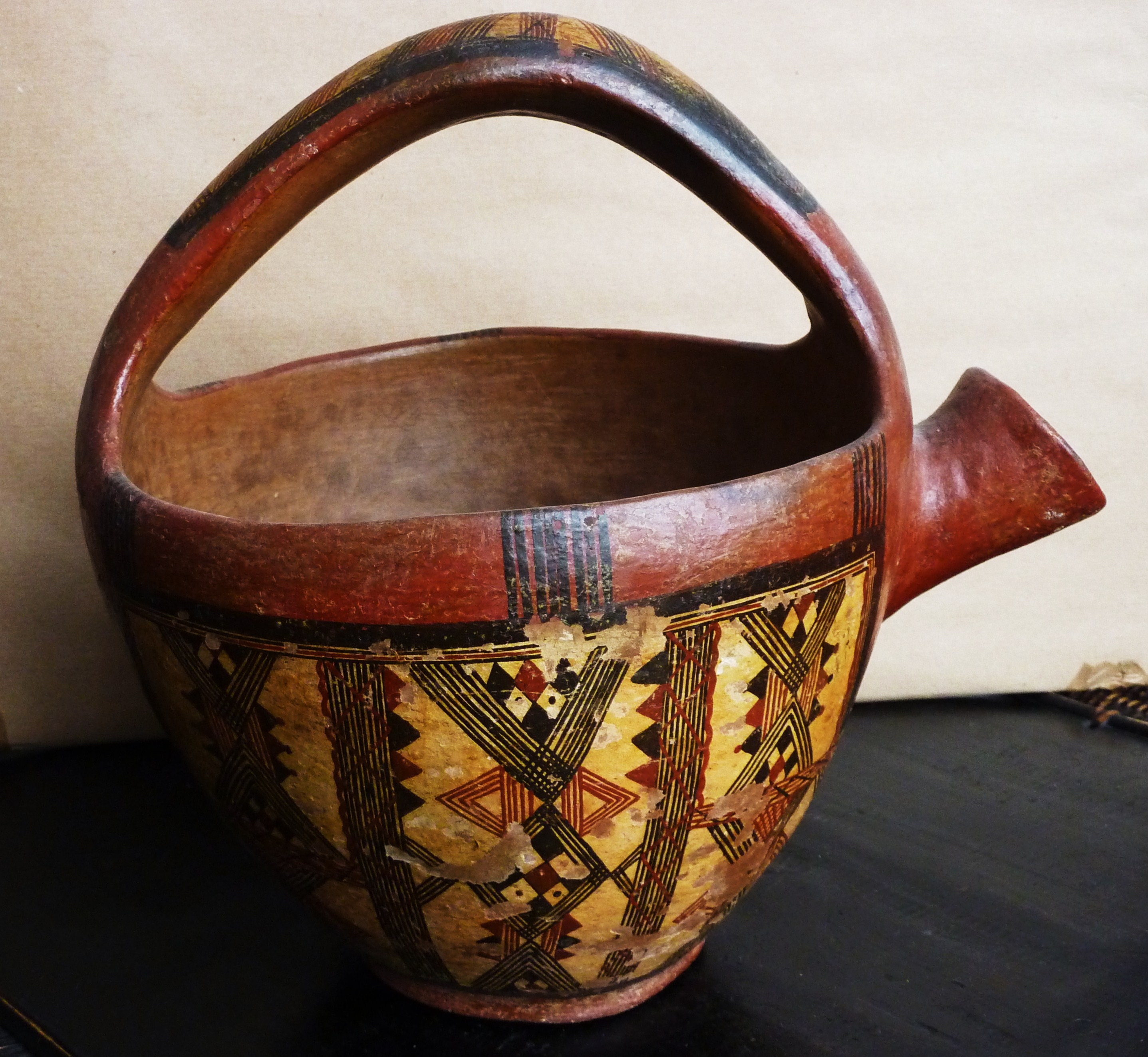 Pot de Kabylie, Algérie, vers 1970